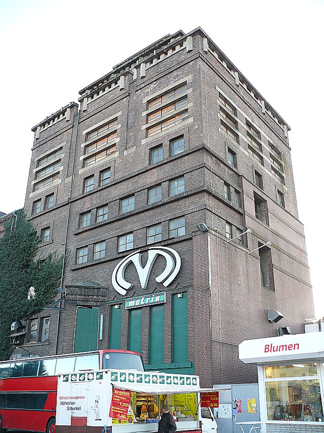 Matrix Bochum, ehemalige Müser-Brauerei